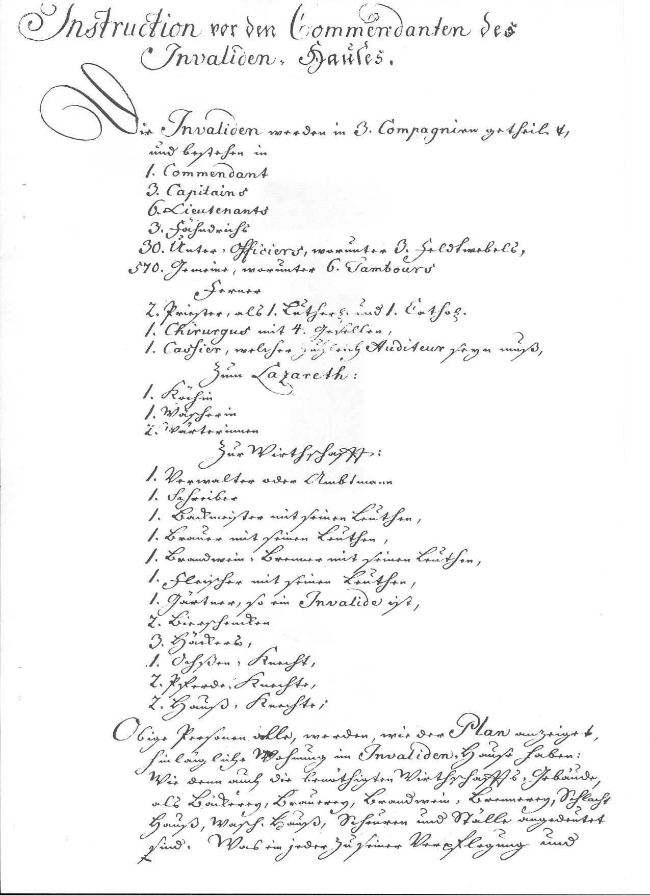 Für die innere Ausgestaltung und Organisation hatte der König die überlieferte „Instruction vor den Commendanten der Invalidenhauses vom 31.08.1748